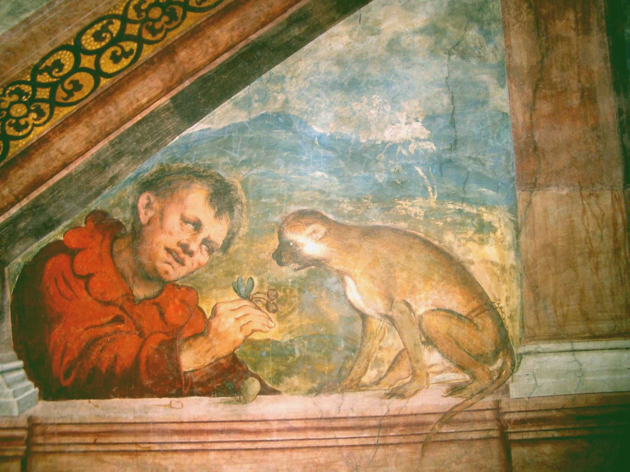 Gerolamo di Romano called Romanino, "The Buffoon playing with a monkey ", 1531-32, fresco, Castello del Buonconsiglio, Trento, Italy Girolamo di Romano, called il Romanino (Brescia 1484/87 – 1566 circa), was an italian painter.